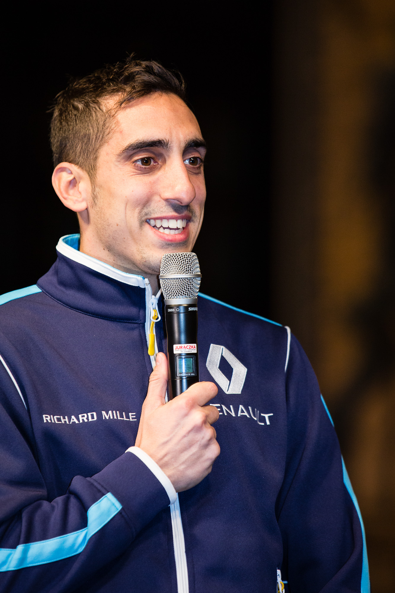 Sébastien Buemi bei der Publikumsveranstaltung "ÖAMTC Welt des Motorsports" Begleitend zu FIA Gala in der Wiener Hofburg am Freitag, 2. Dezember am Wiener Heldenplatz